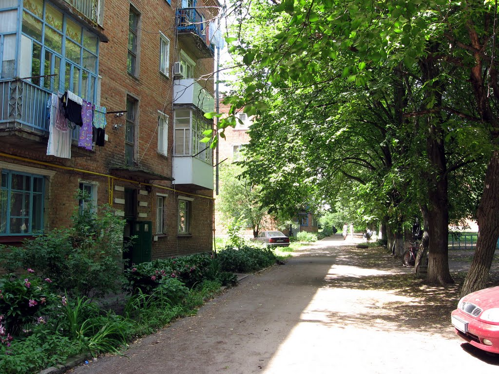 На вулиці Космонавтів, м. Глобине, Полтавська область.